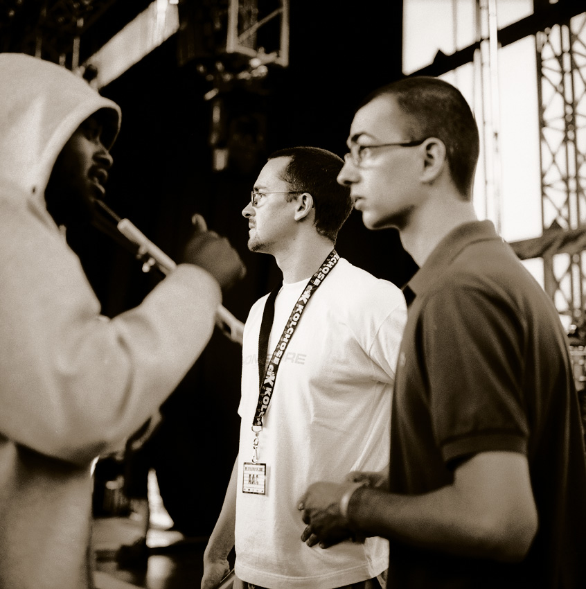 0711 Entertainment Mitbegründer Strachi (Mitte) backstage beim Hip Hop Open in Stuttgart 2001